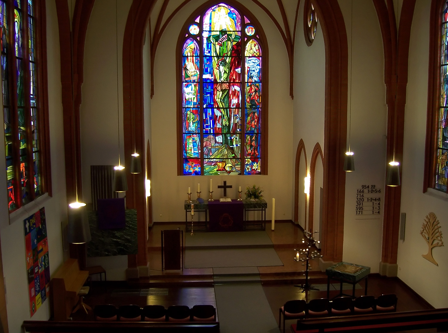 St. Georgs-Kirche in Bremen- Huchting. Blick von der Empore